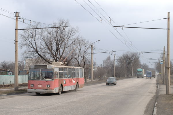 ZiU-9 003 in Wuhlehirsk